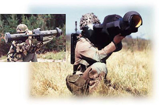 Sistema controcarro apilas